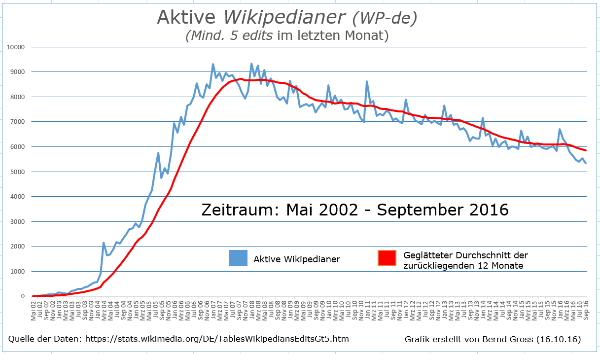 Aktive Wikipedianer mit mindestens 5 edits im letzten Monat in der deutschsprachigen Wikipedia im Zeitraum von Mai 2002 bis September 2016, nach den Oktober-2016-Daten der WMF, Quelle